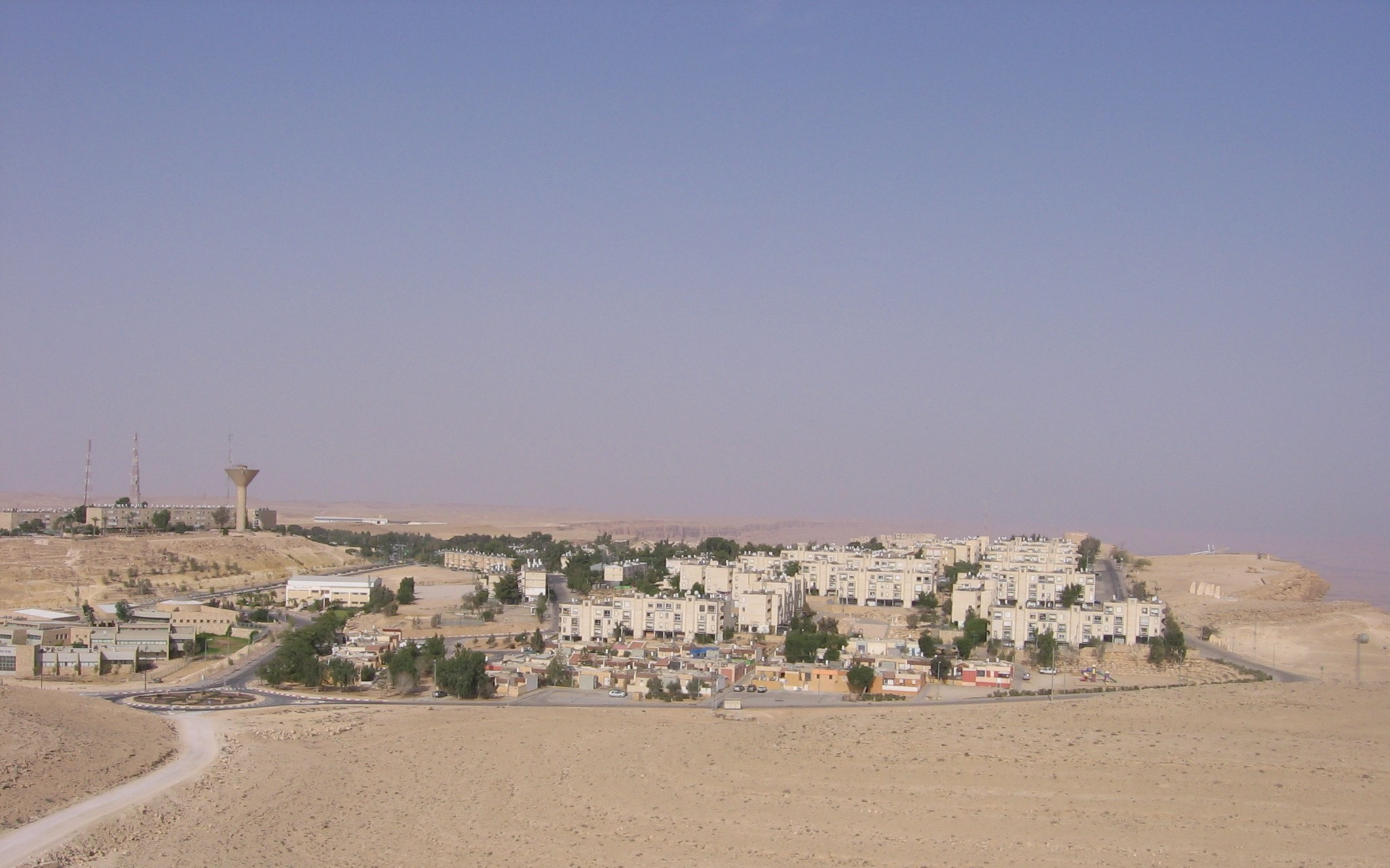 תצפית על מצפה רמון מהר גמל - 2009